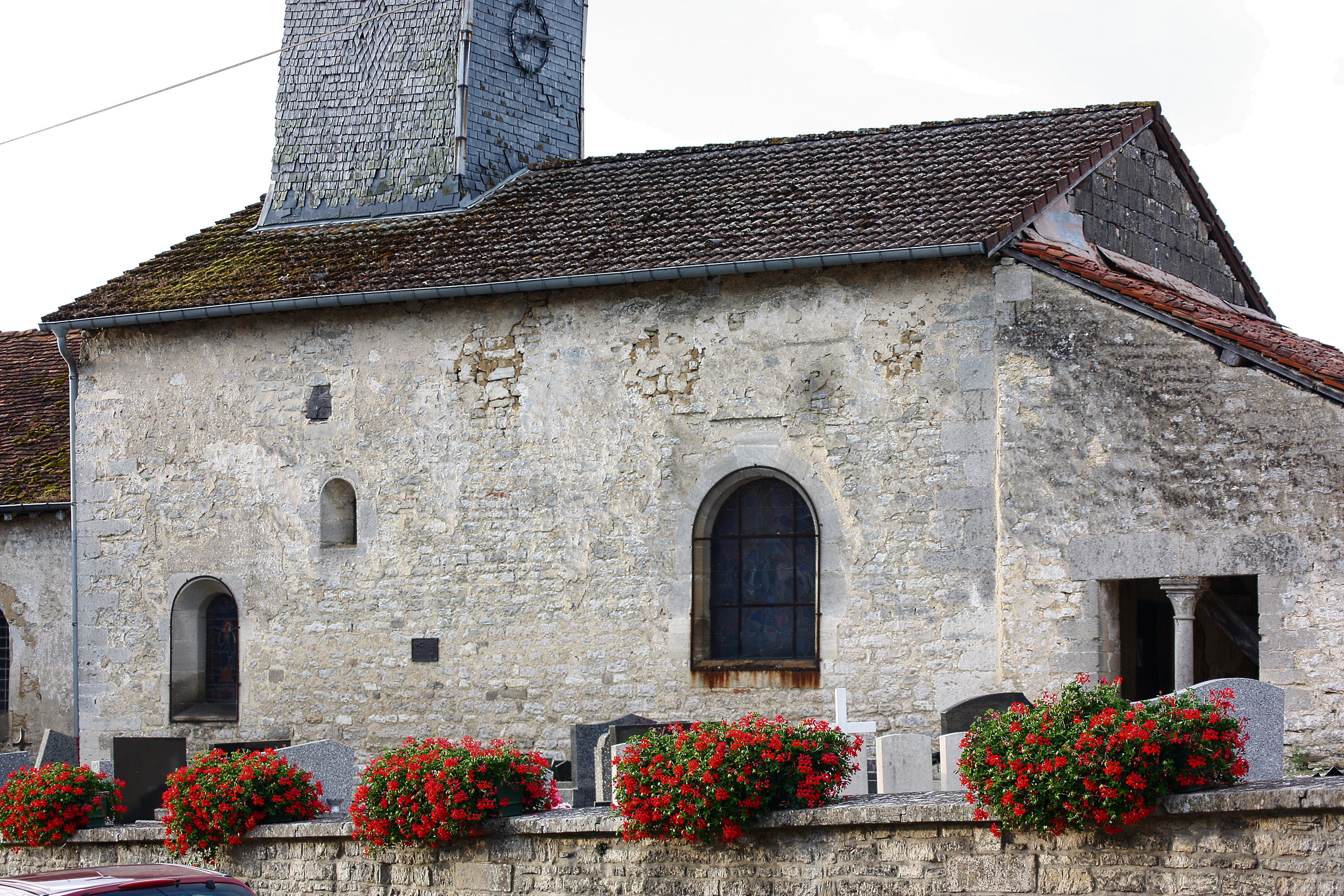 Prez-sur-Marne - Eglise de la Conversion-de-Saint-Paul Eglise romane